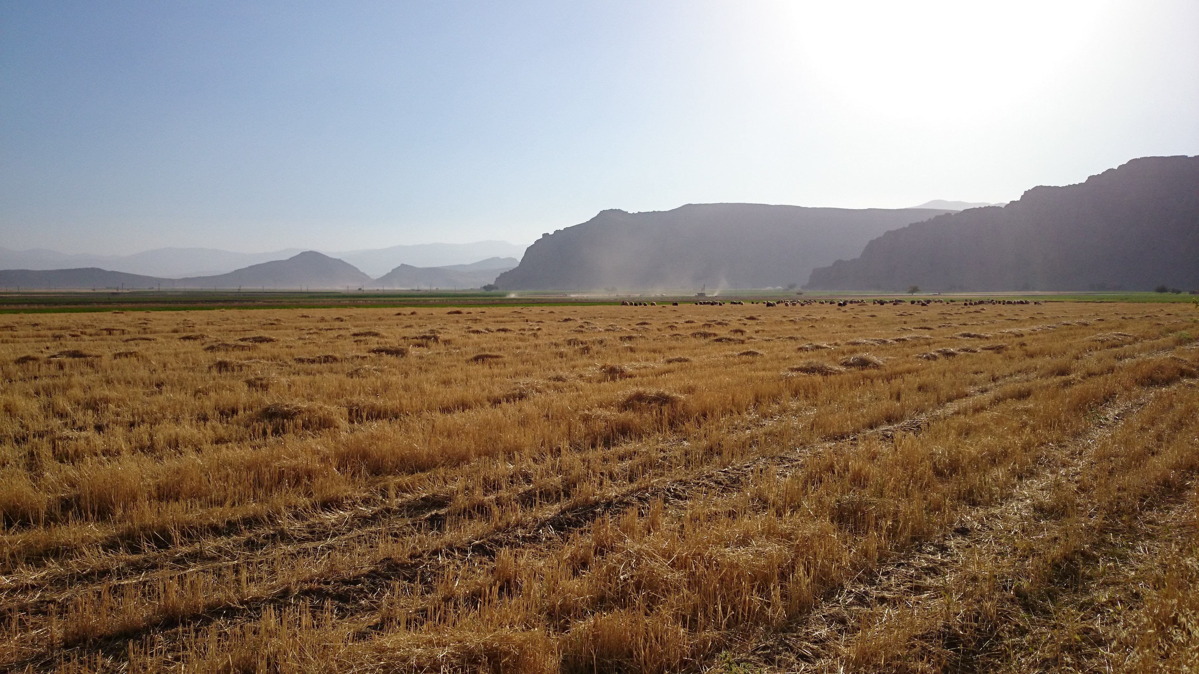 تابستان در روستای بانش